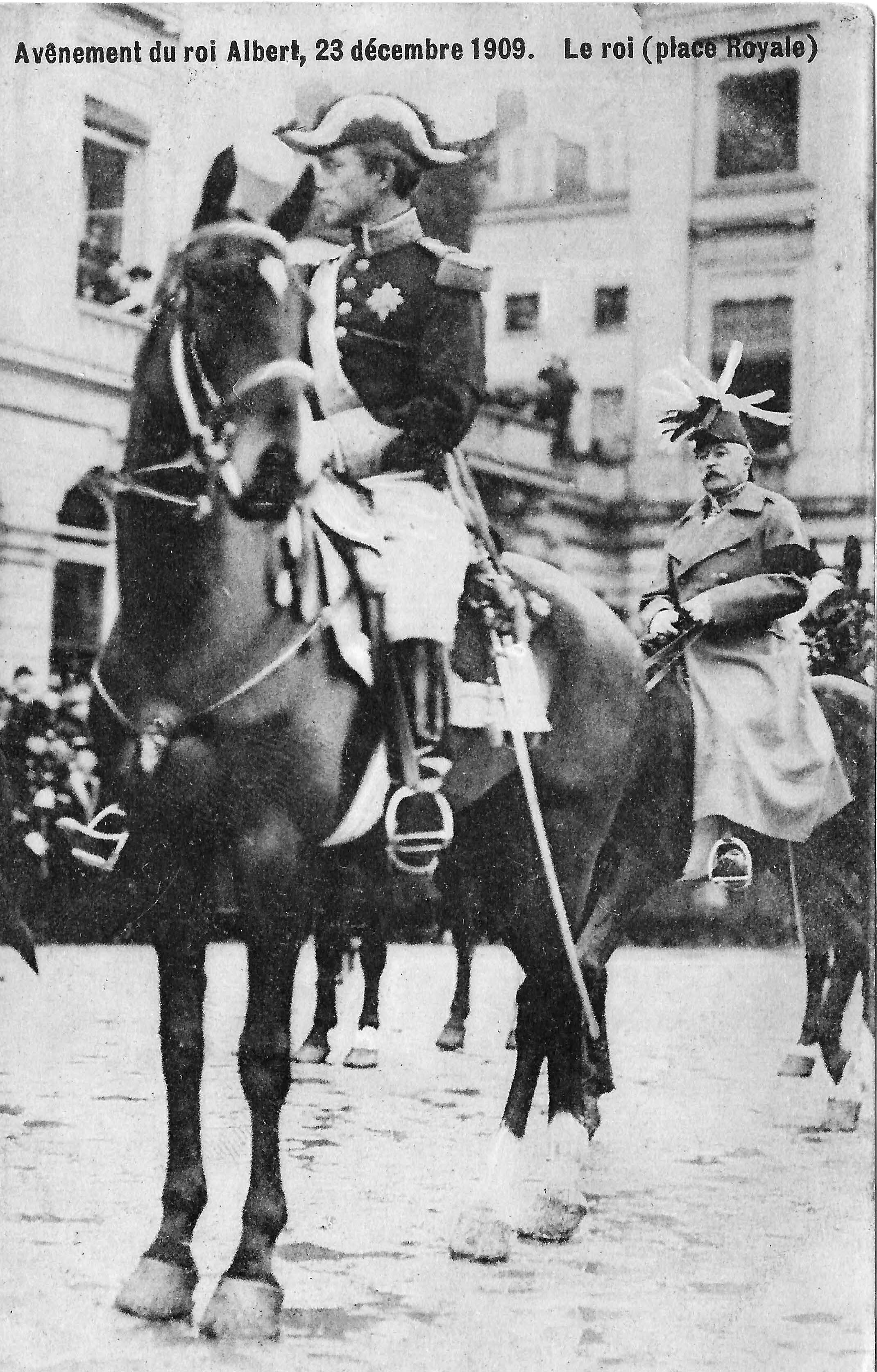 De parade voor de kroning van Albert I in Brussel. De koning te paard.